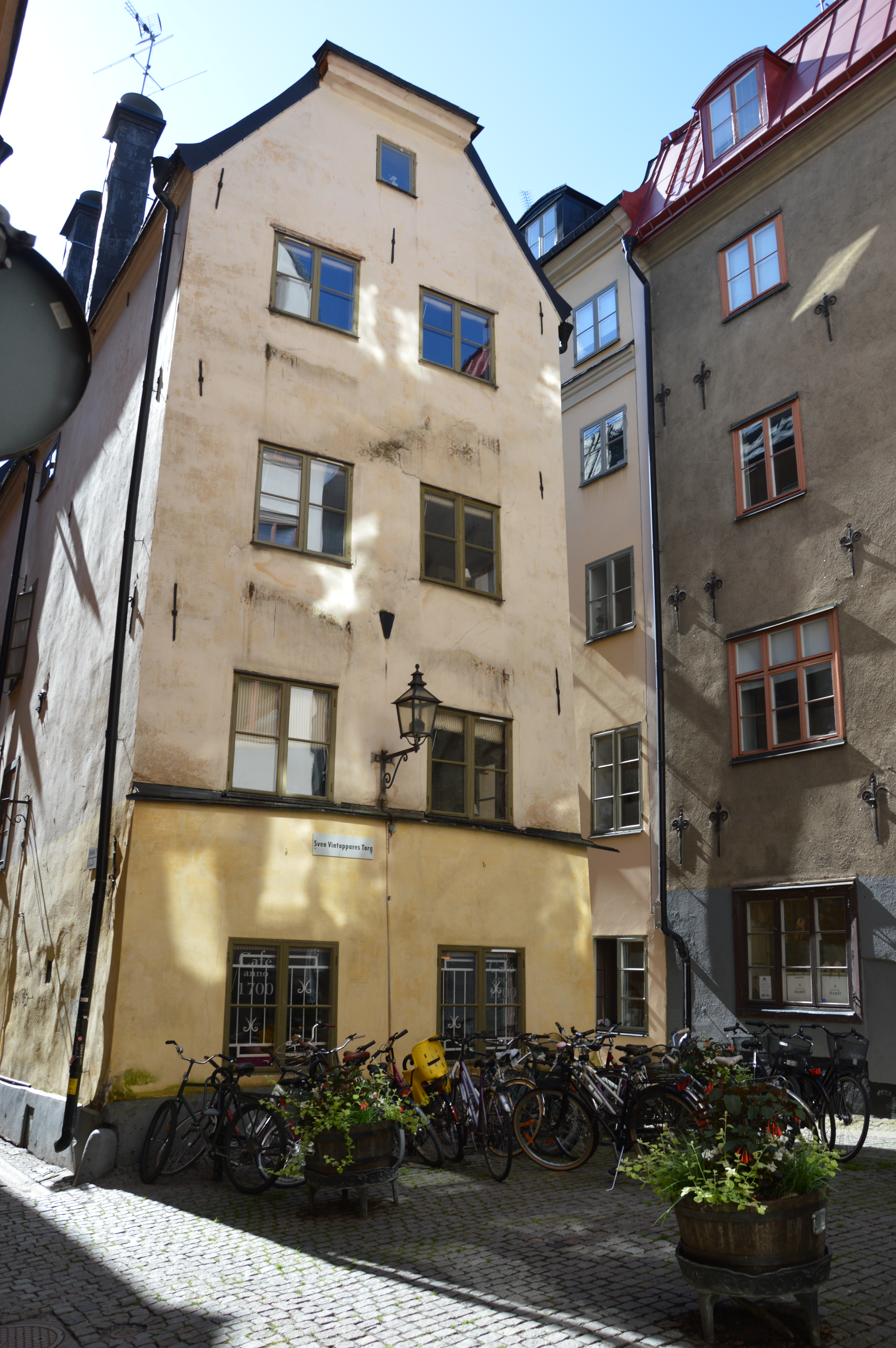 Sven vintappers torg in Stockholm